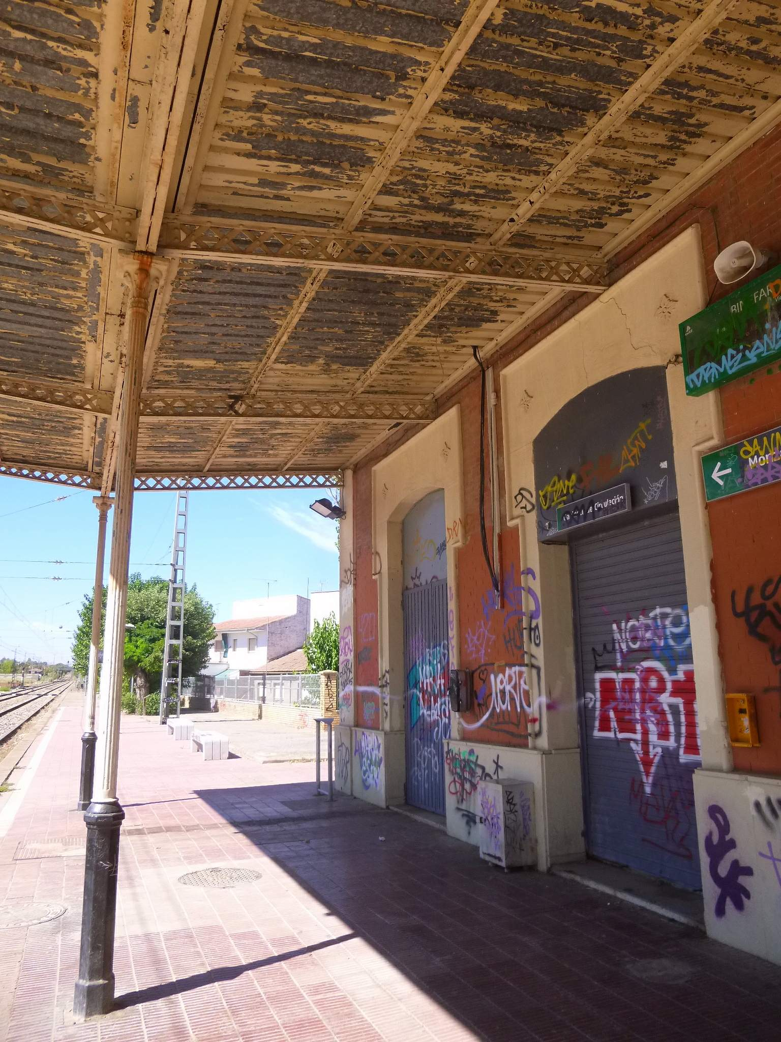 Binéfar - Estación de tren